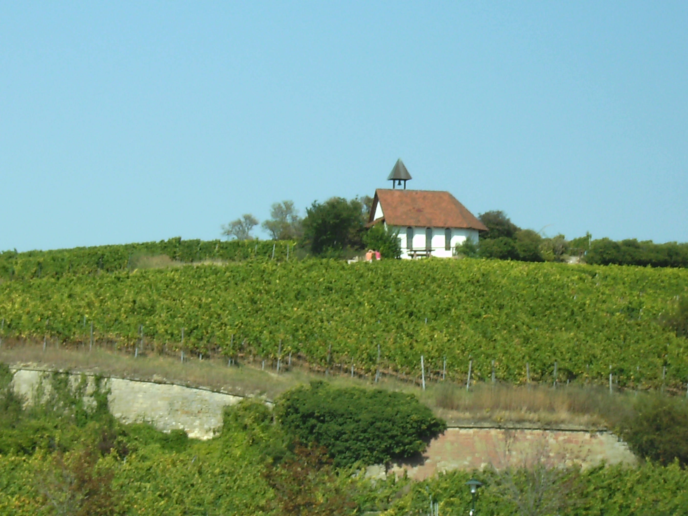 Bad Dürkheim: Kapelle im Weinberg